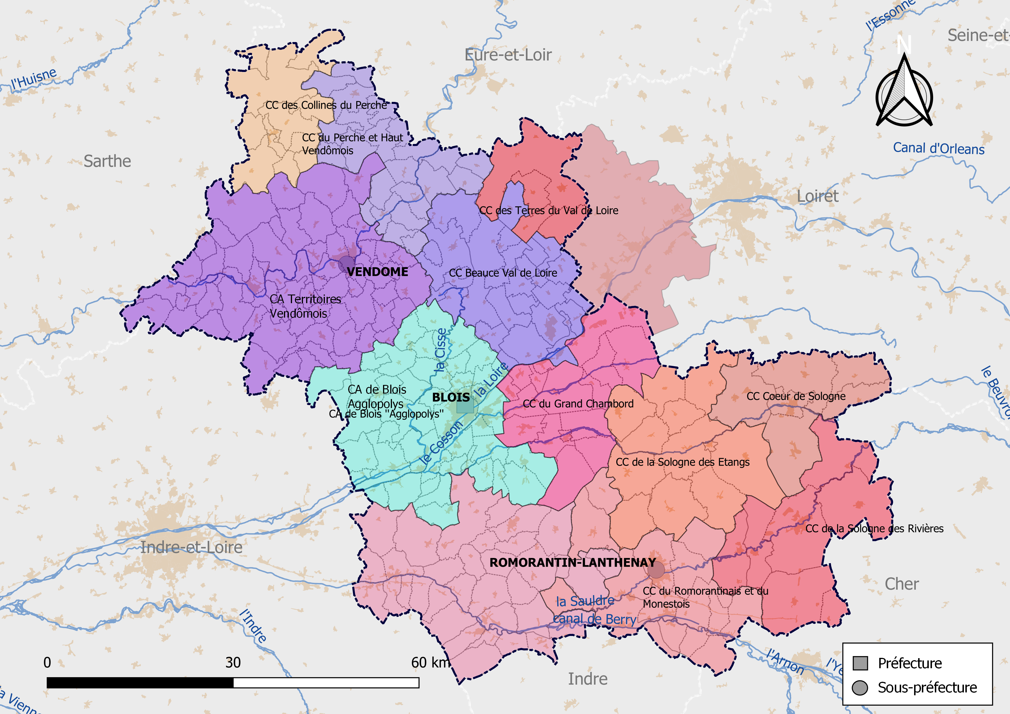 Carte des intercommunalités du département de Loir-et-Cher, France. Composition au 1er janvier 2019.